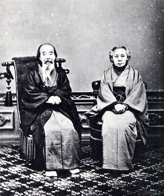 新島襄の父、民治と母、とみ